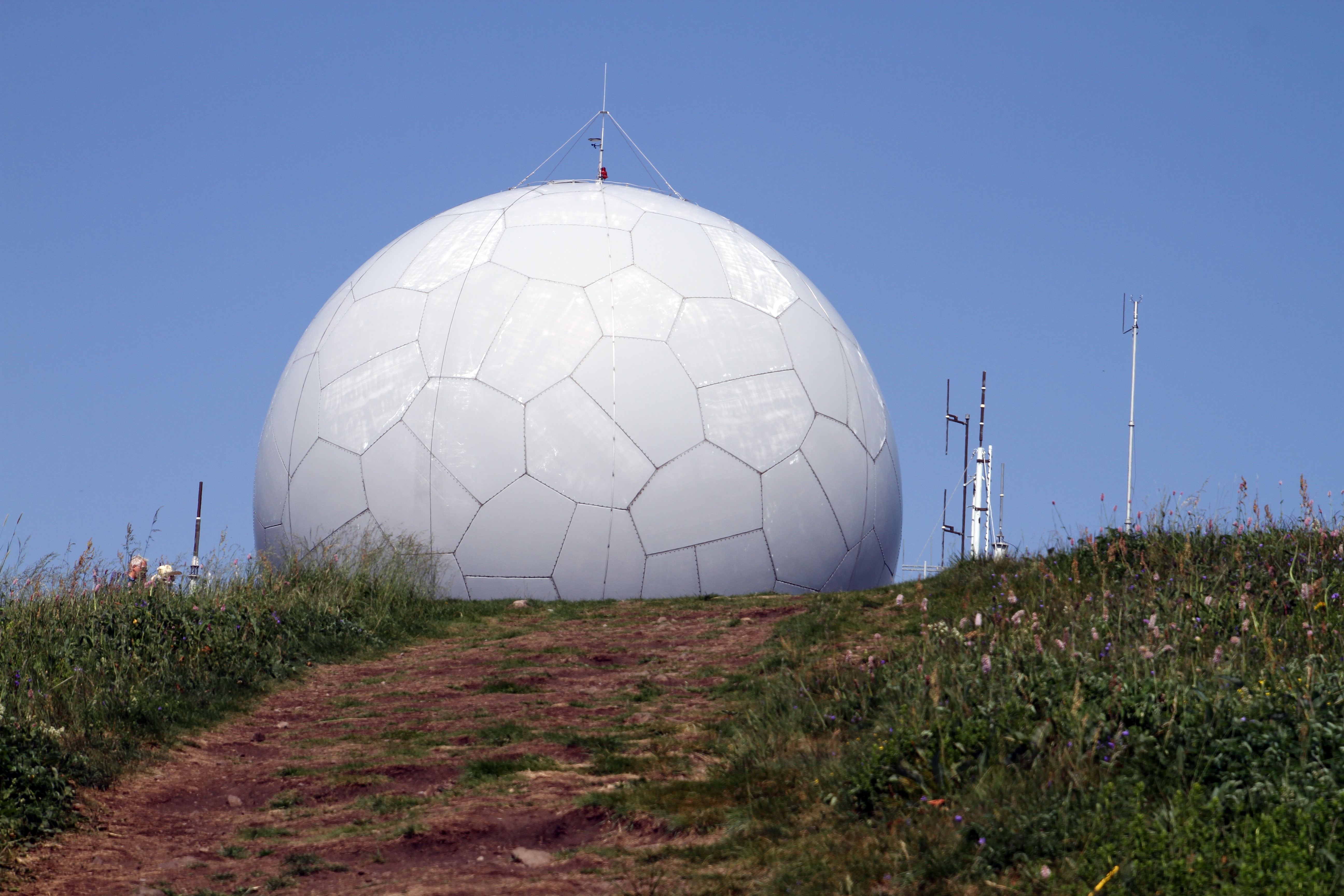 Wasserkuppe in der Rhön in Hessen